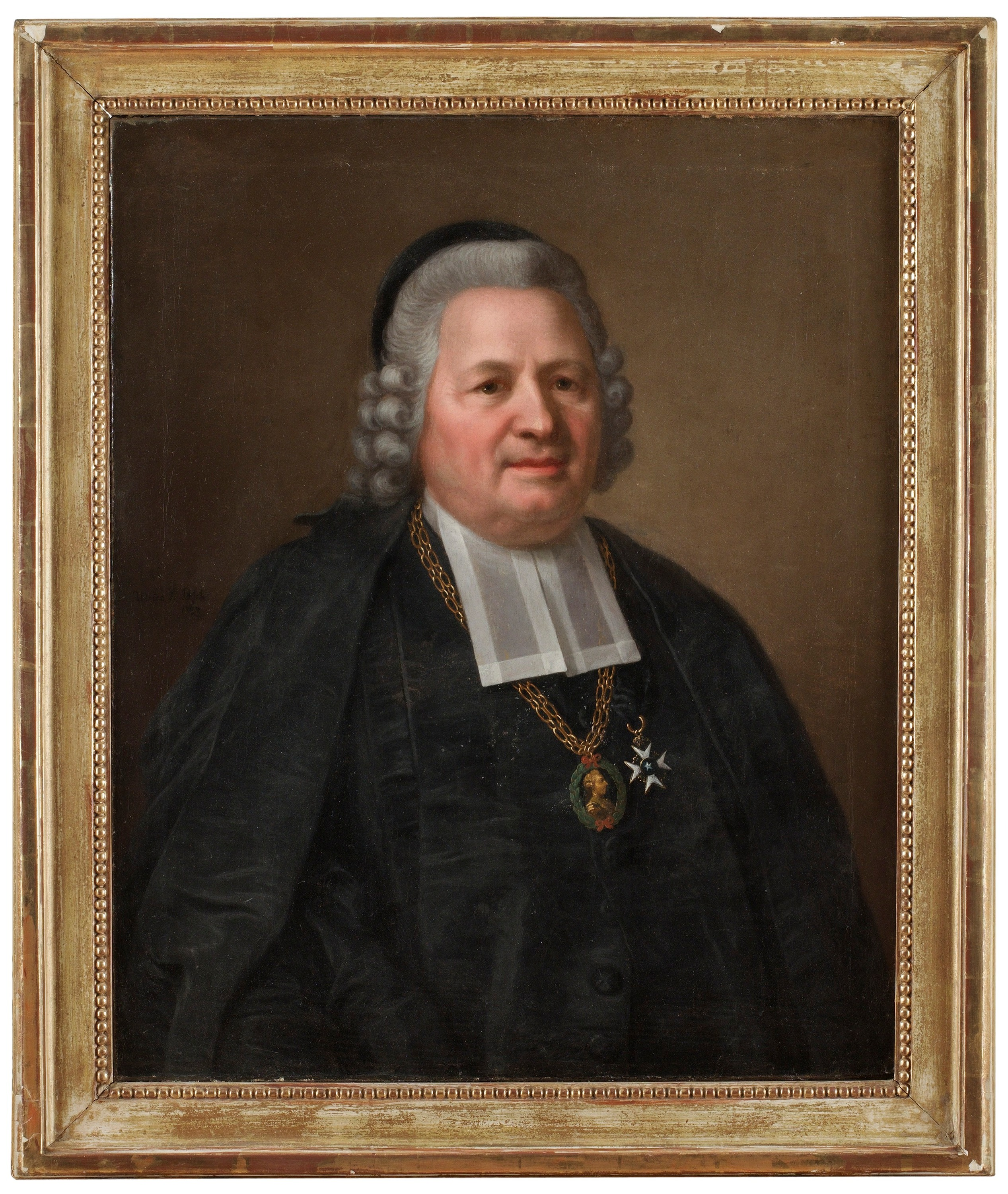 Kyrkoherden i Klara församling, Peter Abraham Nensén (1711-1788). Avporträtterad 1783 av Ulrica Fredrica Pasch.